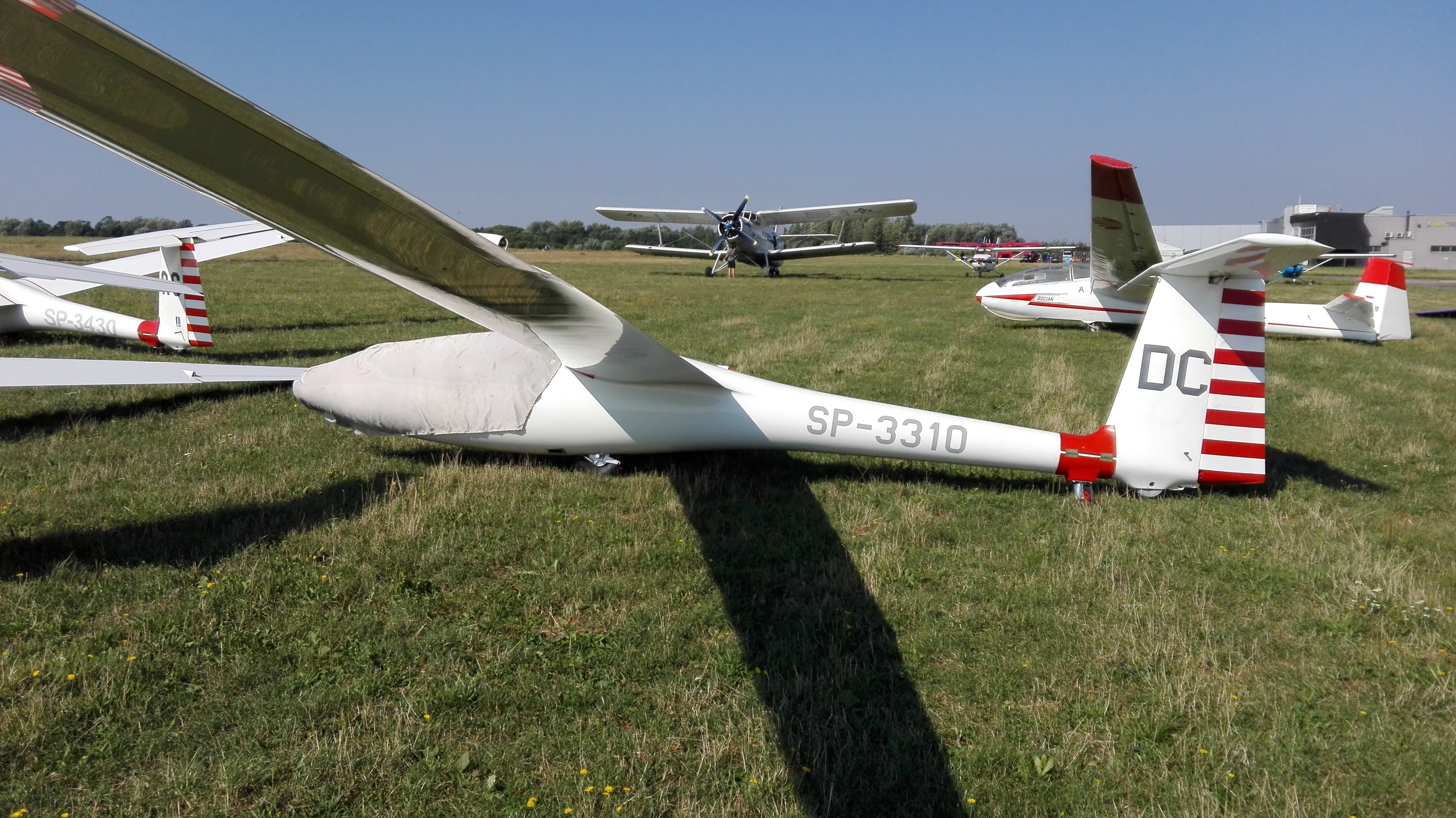 Statki powietrzne: SZD-51 Junior SP-3310(DC), SP-3430(AC), SZD-9 Bocian SP-3046, An-2 SP-AOB, Cessna 172 Skyhawk H SP-FLT, Cessna 150 SP-KNC — lotnisko Gliwice-Trynek